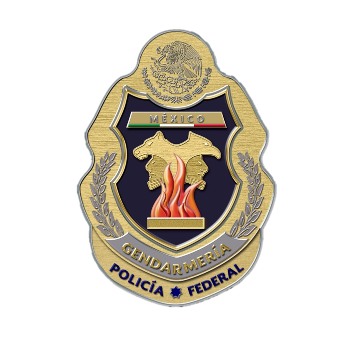 Escudo oficial de la División de Gendarmería de la Policía Federal.